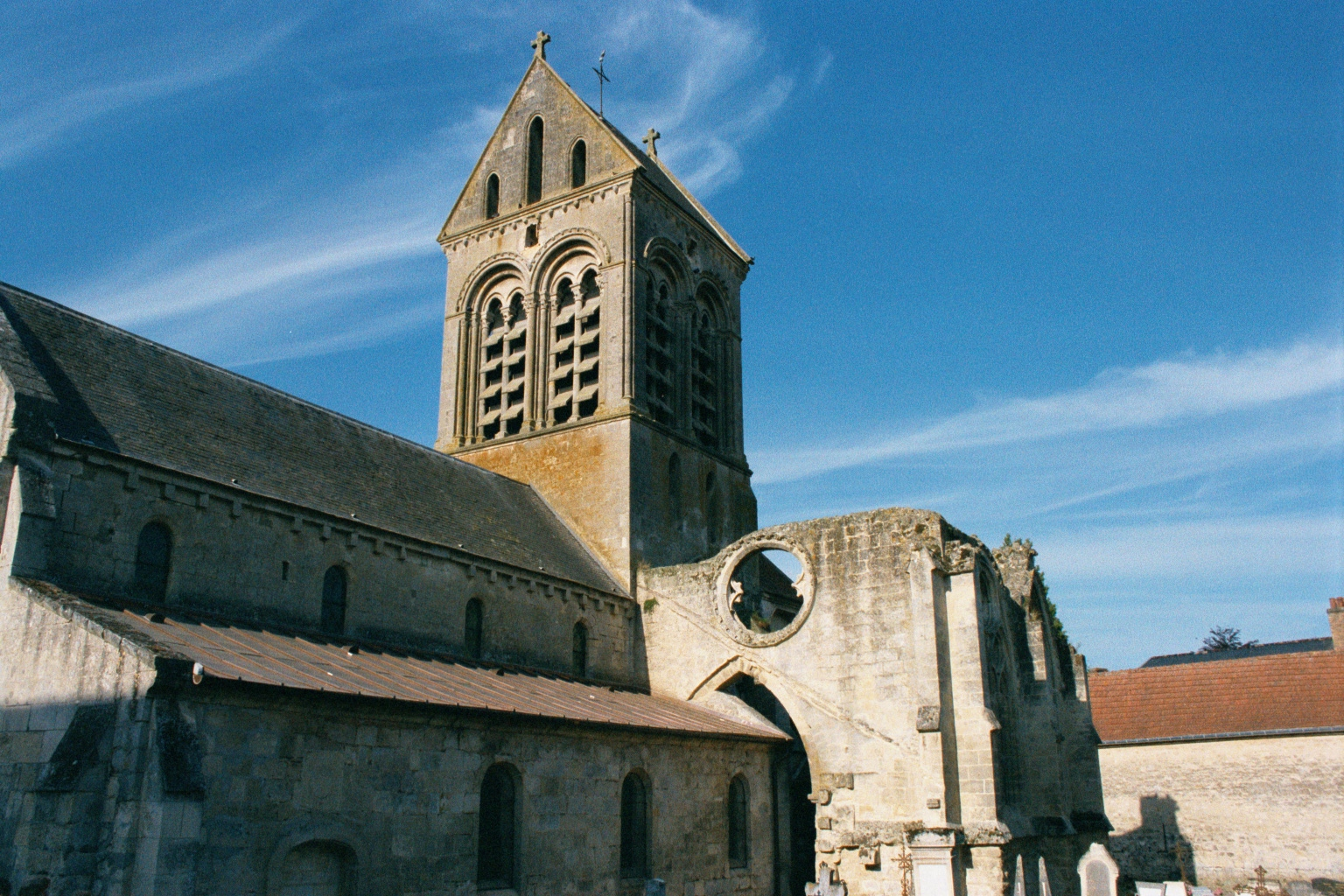 Eglise du XIIème siècle à Cuiry-Housse, Aisne, Picardie, France (N49°17'43,37" E3°29'31,35")